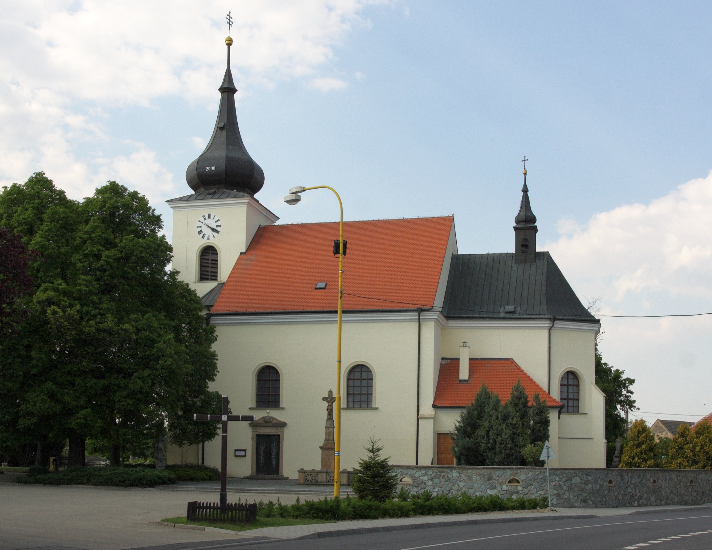 Velké Němčice - kostel svatých Václava a Víta